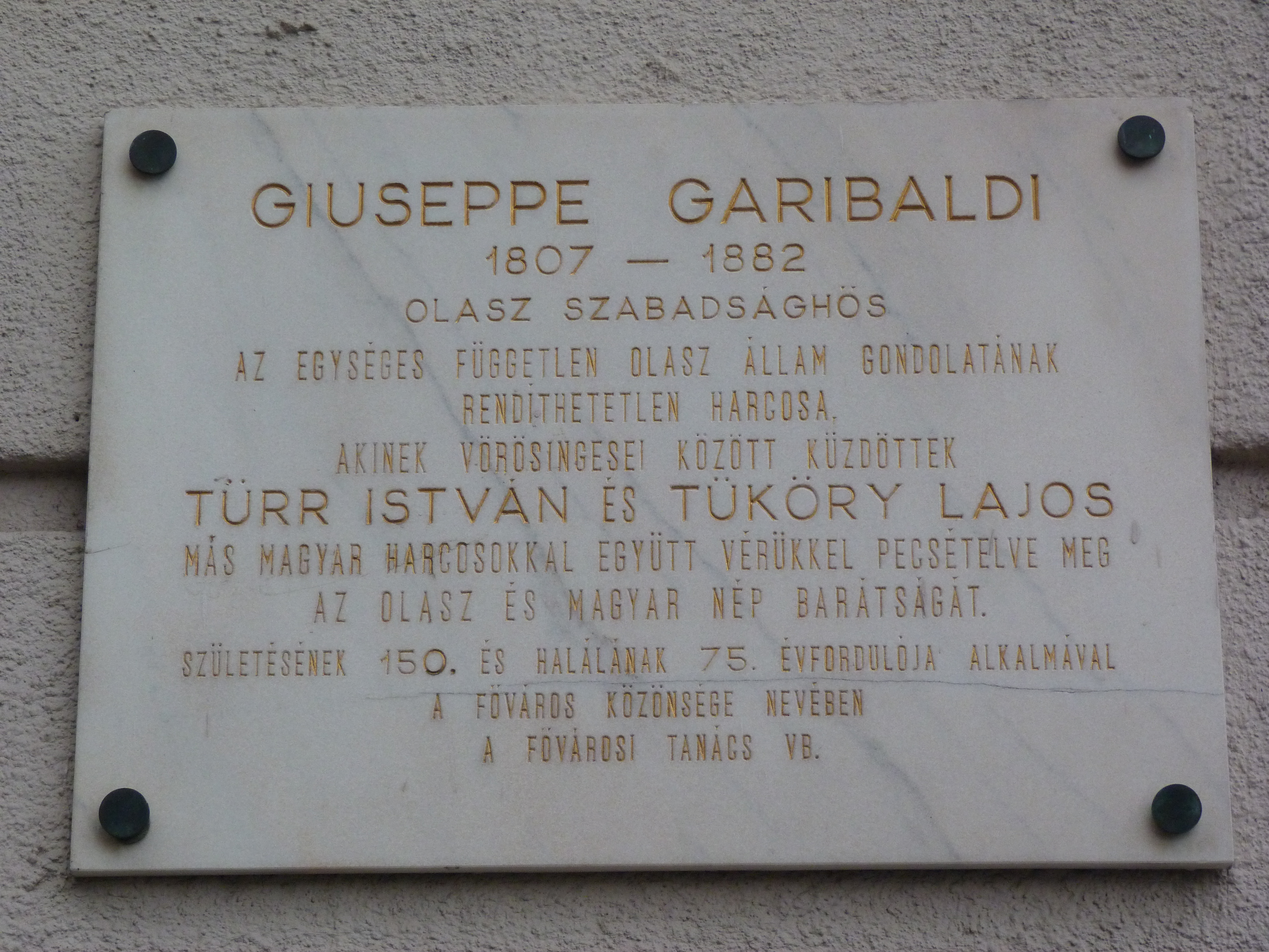 A felvétel 2013. január 23 -án készült Budapesten. A Belvárosban, a Garibaldi utca 1 szám alatt, Giuseppe Garibaldi emléktáblája. ©© Published under Creative Commons in the Metapolisz DVD line. All of the photos and vids in the Metapolisz DVD line are under Creative Commons and can be used even for commercial – for profit – purposes. Recommended Citation Derzsi Elekes Andor: Metapolisz DVD line ©© Megjelent Creative Commons alatt a Metapolisz sorozatban. A Metapolisz sorozat valamennyi képe és filmje Creative Commons alatti valamint kereskedelmi - for profit - célra is felhasználható. Ajánlott hivatkozás: Derzsi Elekes Andor: Metapolisz DVD line